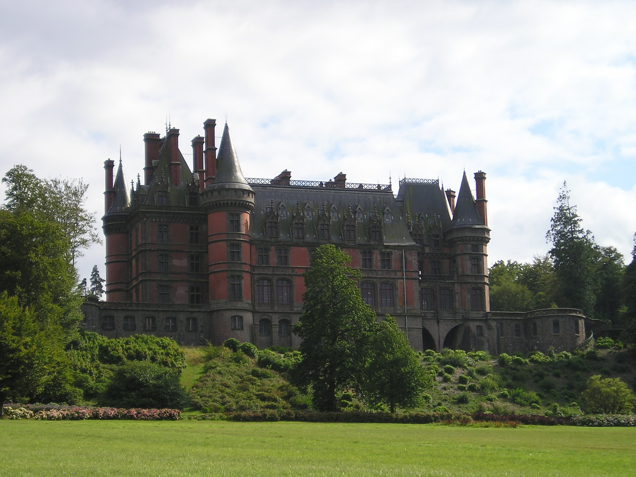 Façade Nord Trévarez